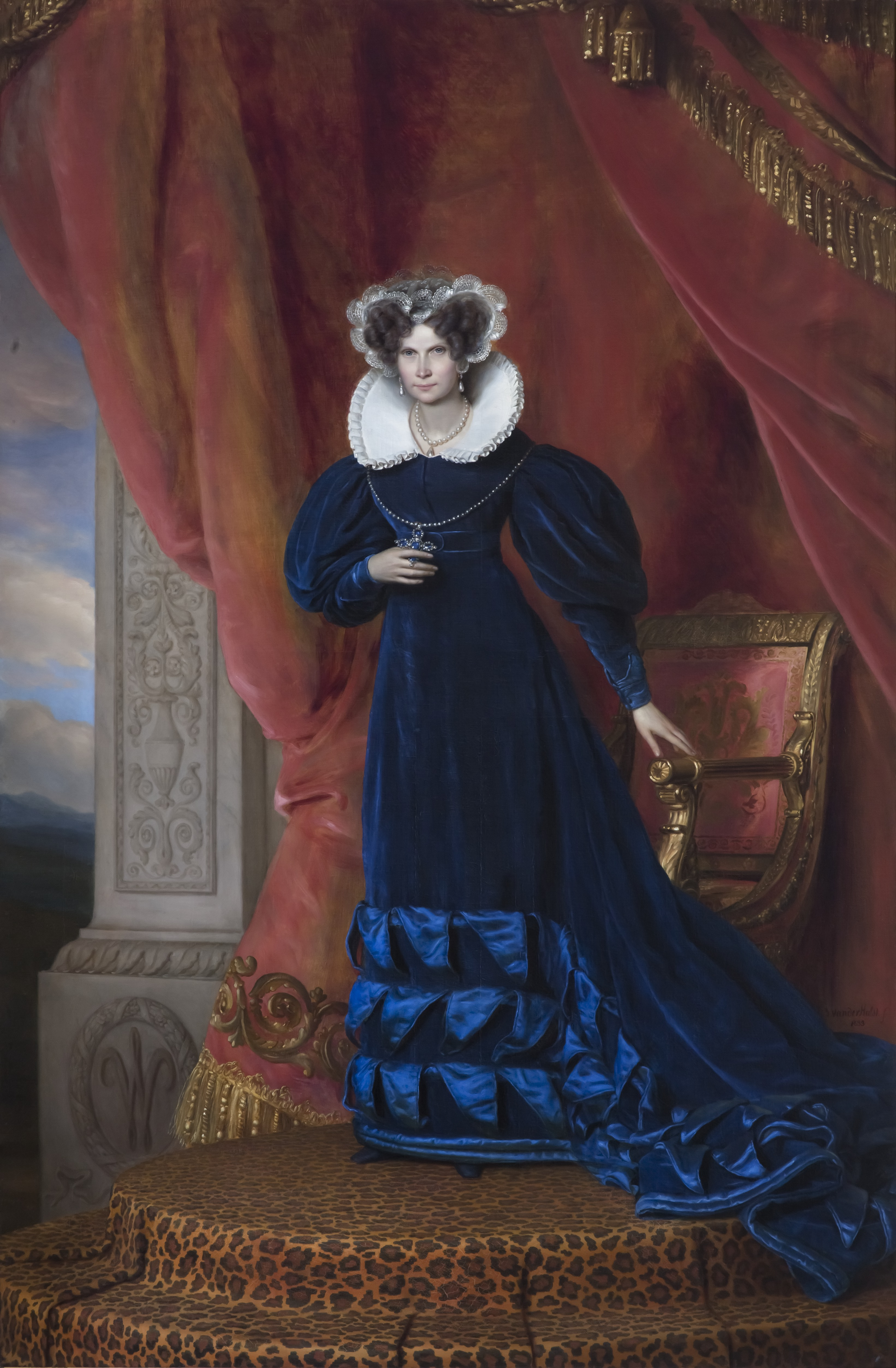 Wilhelmina van Pruisen, koningin der Nederlanden (1774-1837)